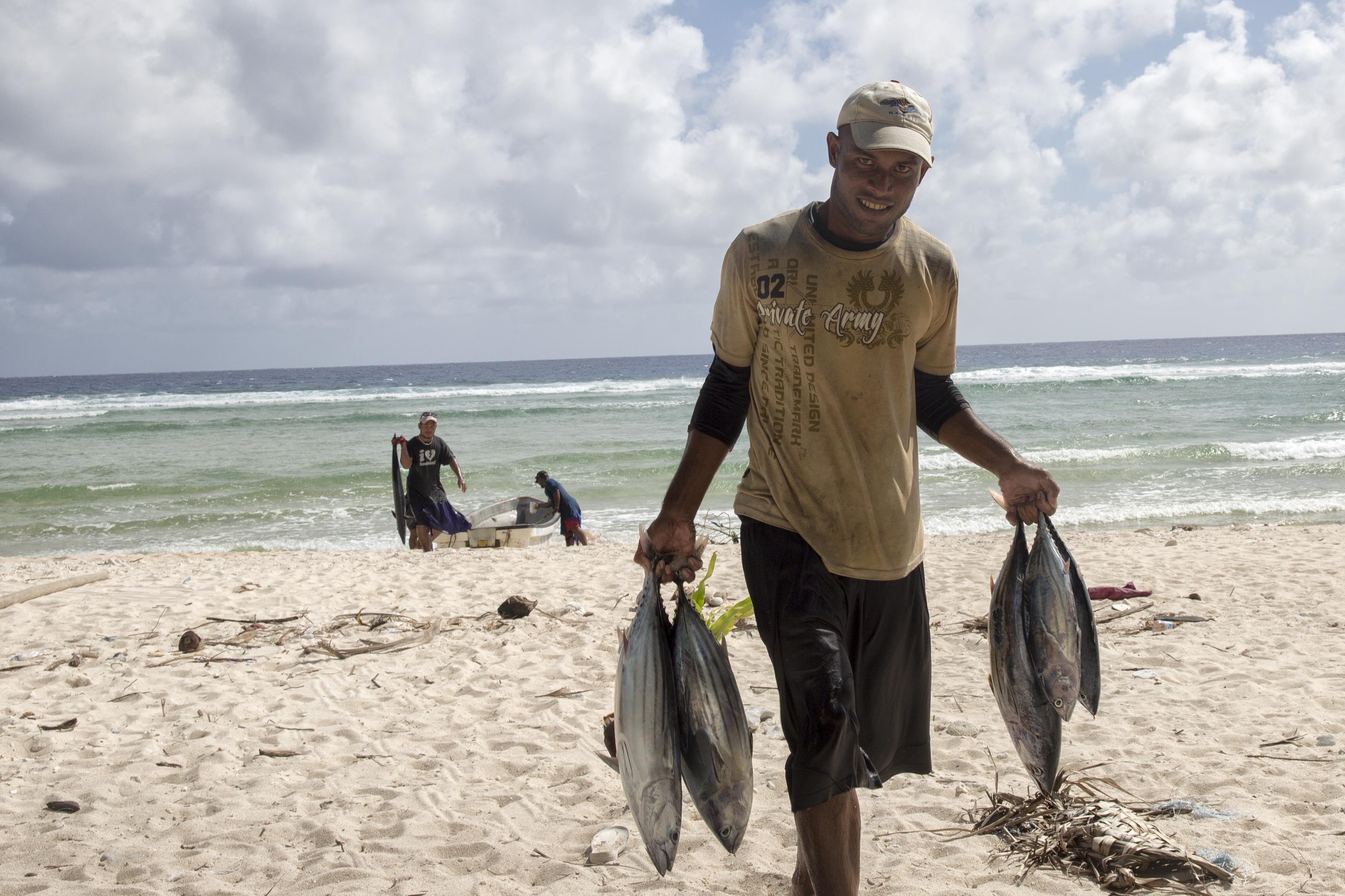 Un pêcheur de l'île de Fais portant du thon à une maison des hommes